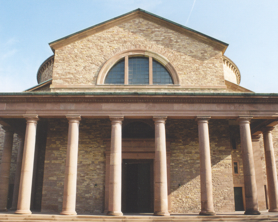 Sankt Stephan : die Vorderseite mit Säulenhalle, entworfen und ausgeführt 1808-14 durch Friedrich Weinbrenner. Neben dem Karlsruher Marktplatz das Meisterwerk im Oeuvre Weinbrenners.